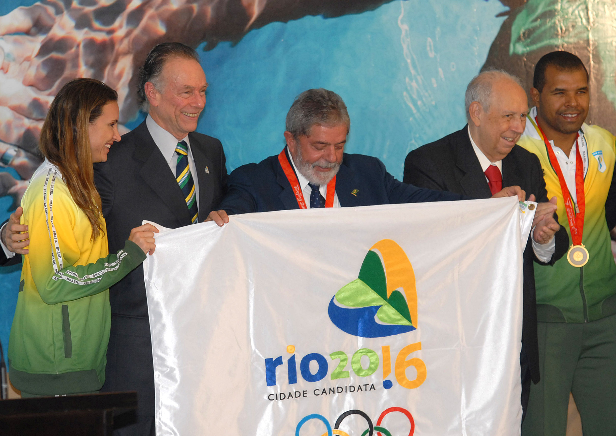 Brasília - Presidente Lula com a bandeira alusiva à candidatura do Rio para os Jogos Olímpicos de 2016, durante encontro com atletas medalhistas dos Jogos Olímpicos e Paraolímpicos de Pequim.